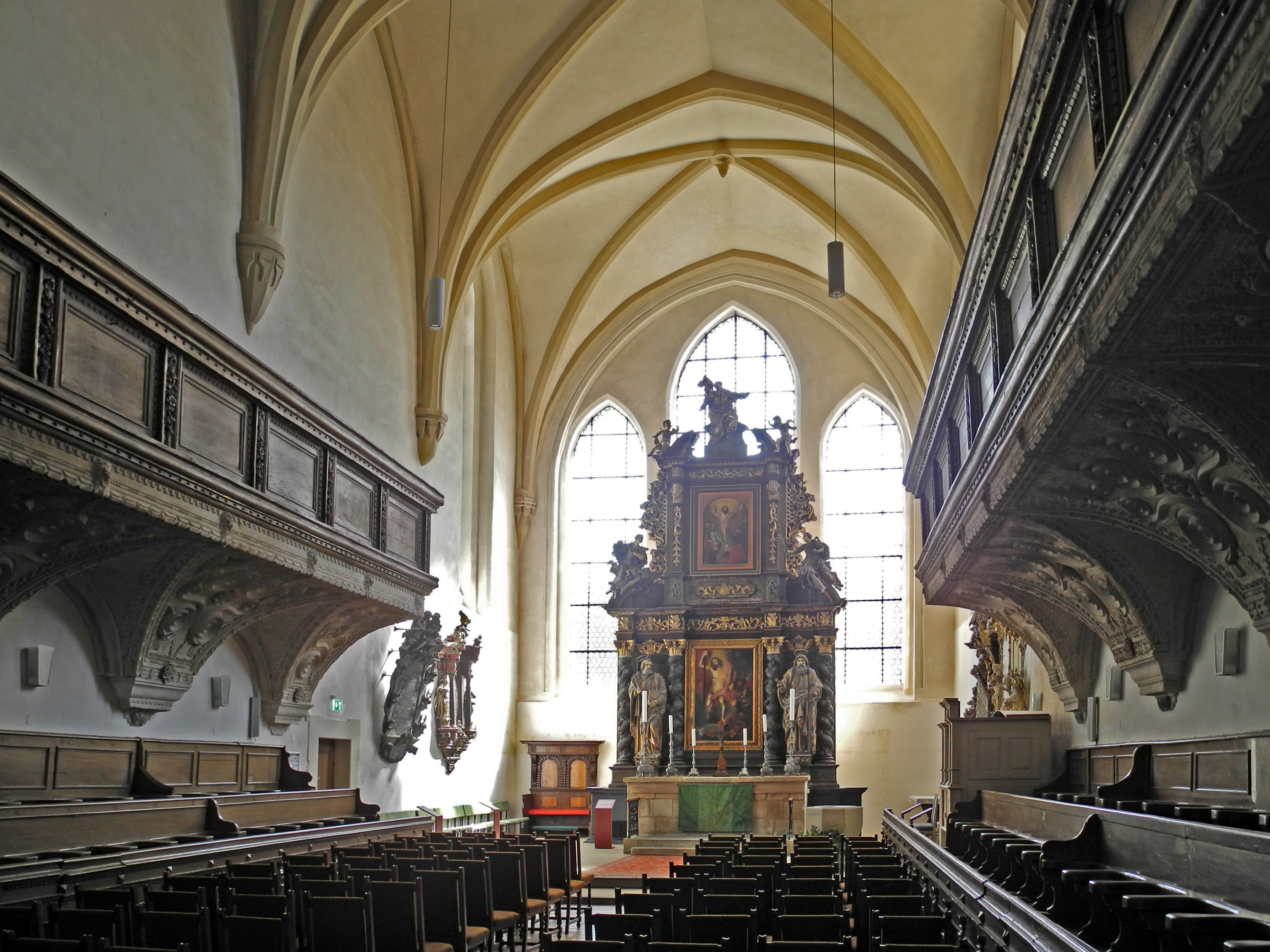 Klosterkirche St. Peter und Paul des ehem. Franziskanerklosters Zittau: Chorraum mit Altar von 1668 (wird noch als Sakralraum genutzt)